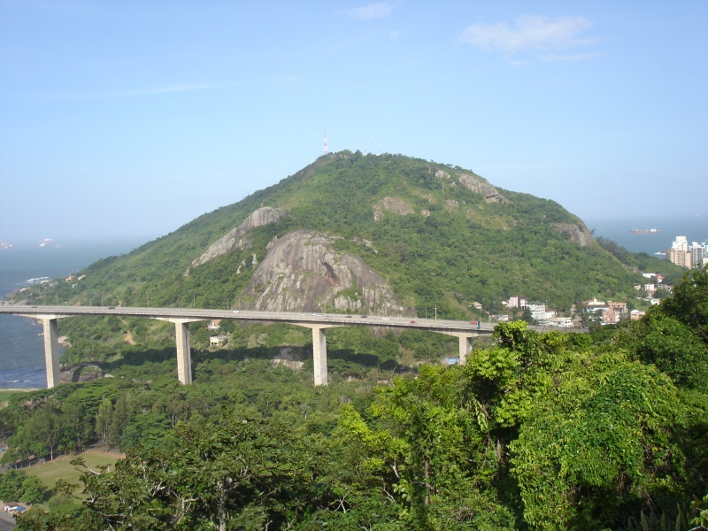 Morro do Moreno visto do Convento da Penha.